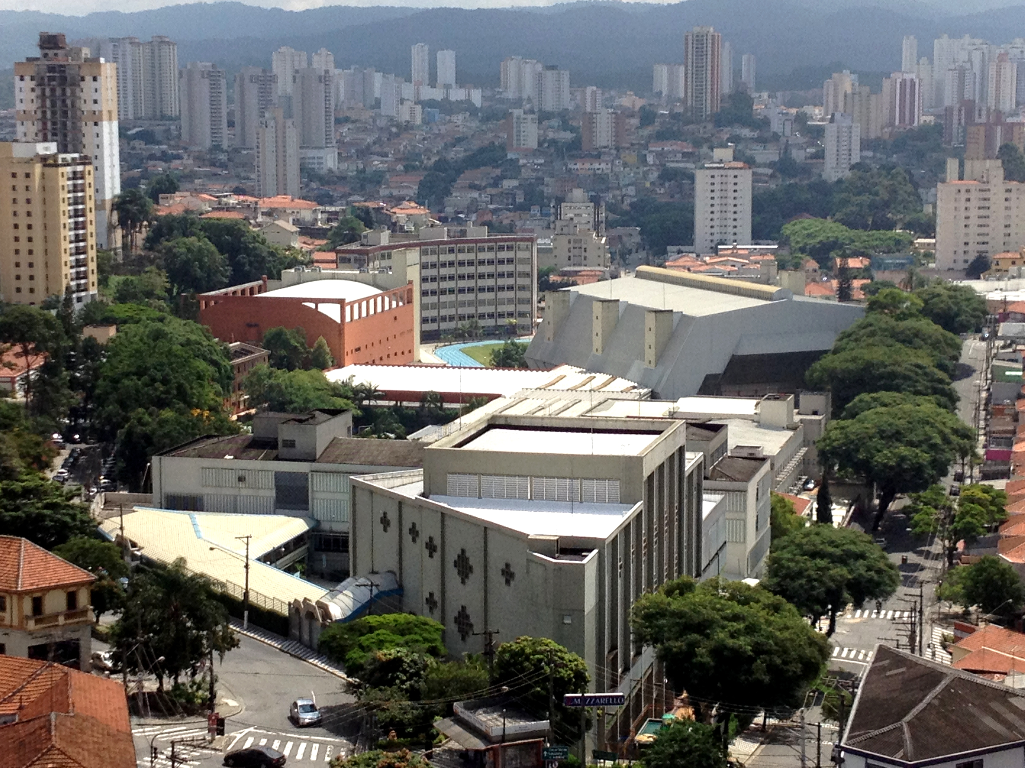 Colégios Mazarello e Salesiano, localizados em Santa Terezinha, Santana, Zona norte de São Paulo, Brasil.